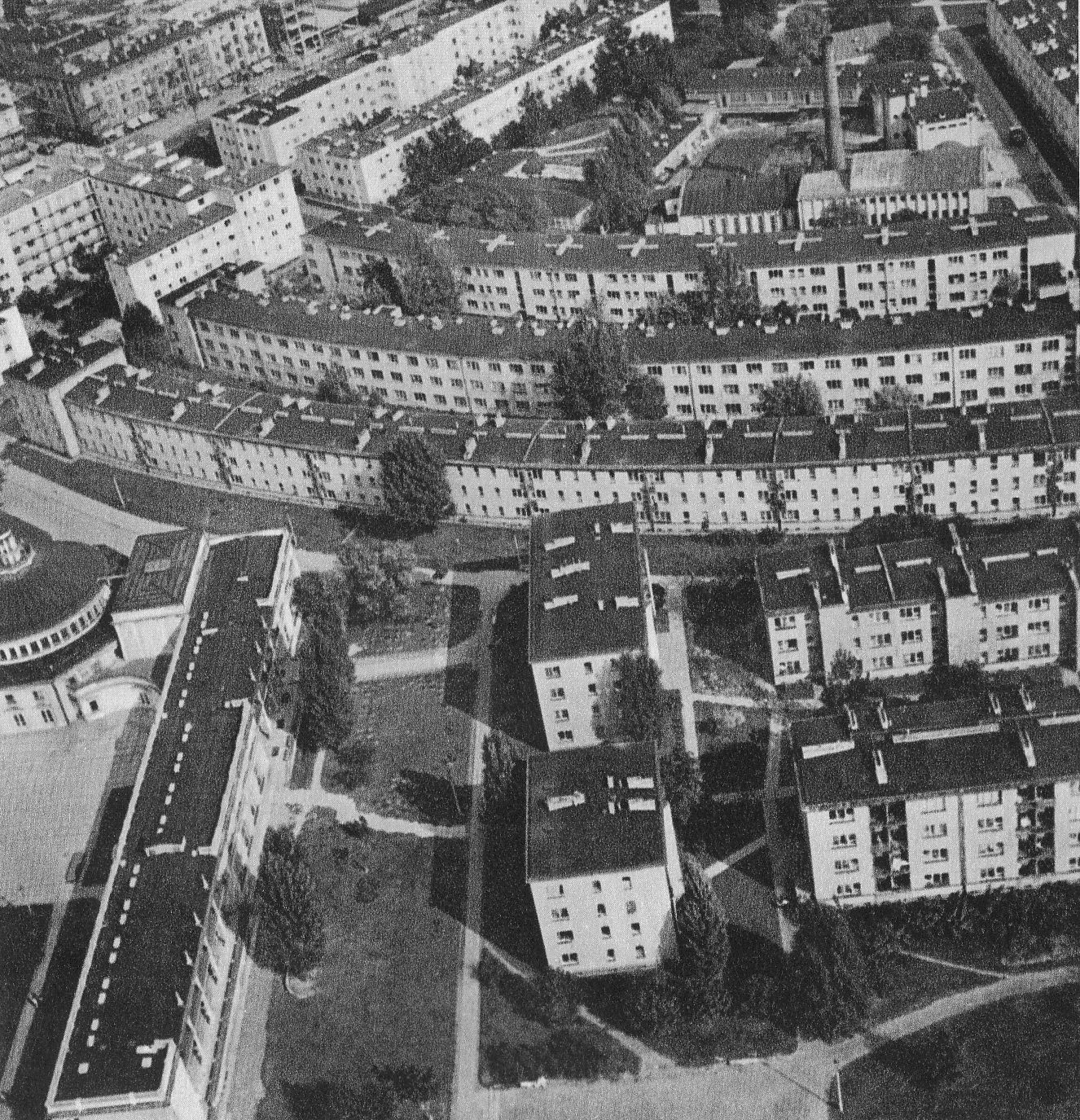 Osiedle WSM na Żoliborzu